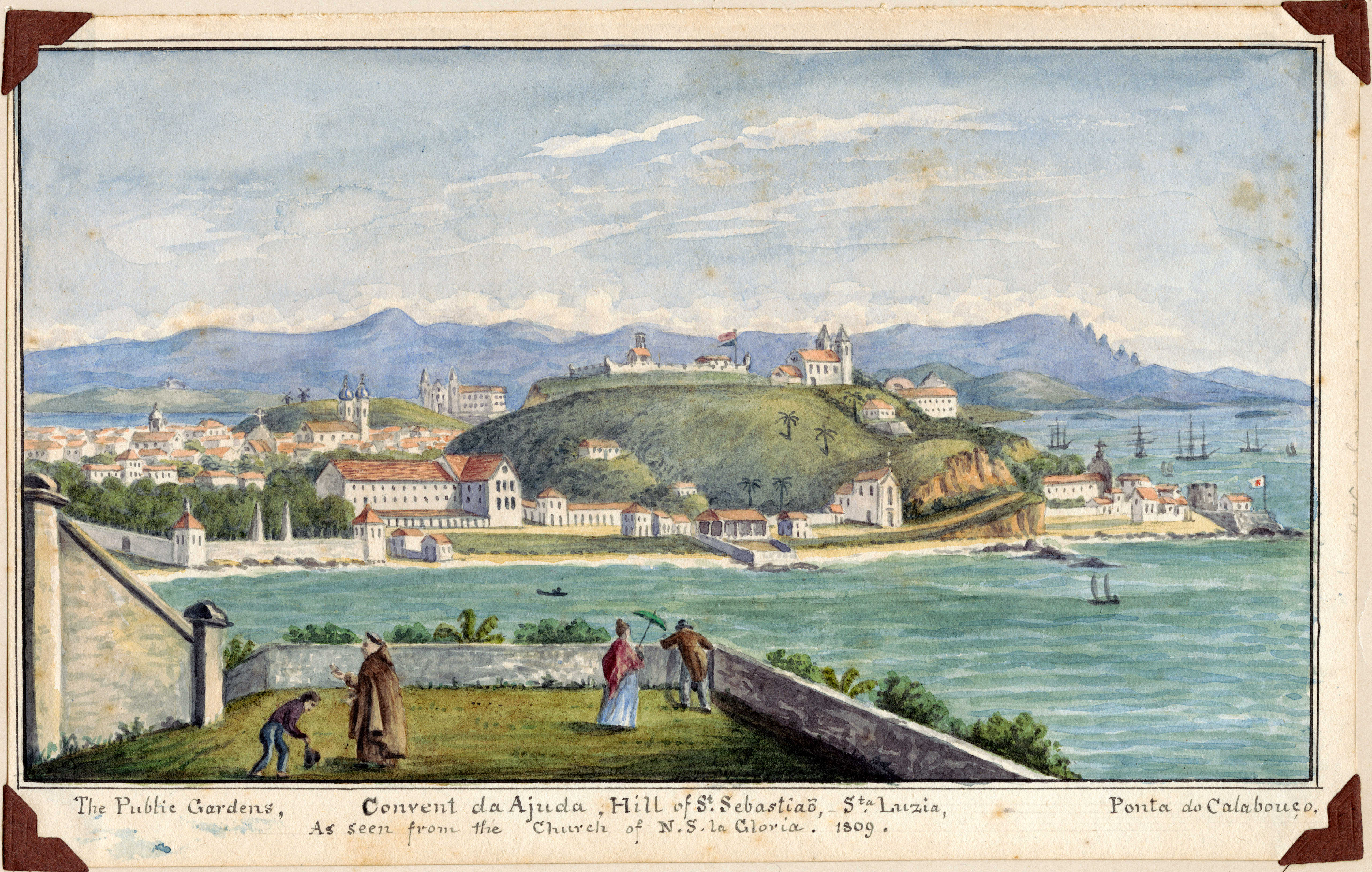 Aquarela de Richard Bate (1775-1856). Panorama do terraço da Igreja da Glória em 1809 mostrando toda a marinha, do Passeio Público até a ponta do Calabouço. Da esquerda para a direita: Passeio Público, Convento da Ajuda, Morro do Castelo (ou de São Sebastião), Praia de Santa Luzia, Ponta do Calabouço. Fonte: Digital Collections da Cornell University.